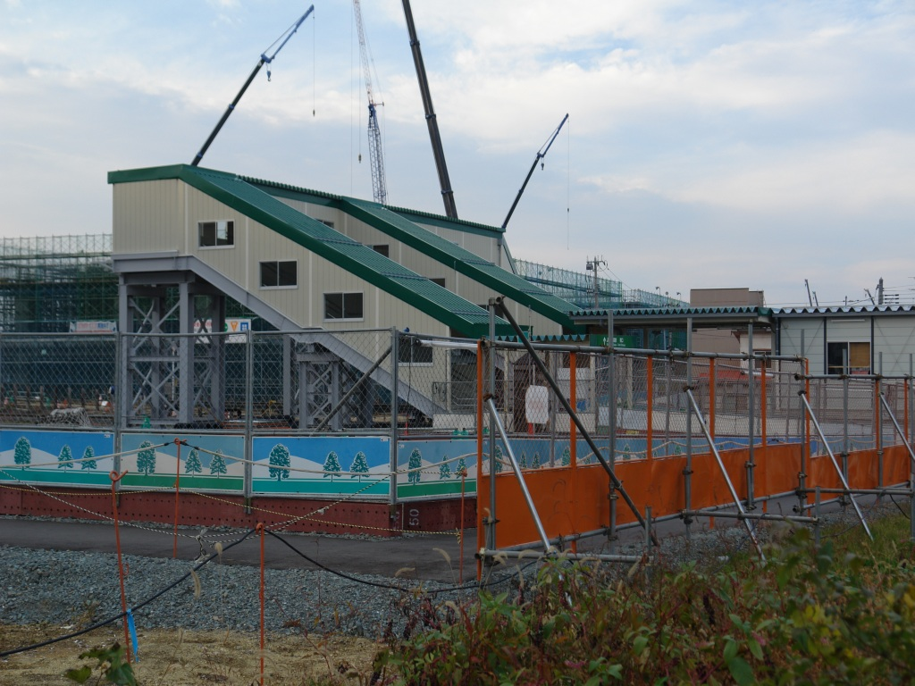 Shin-Aomori station in November 2007